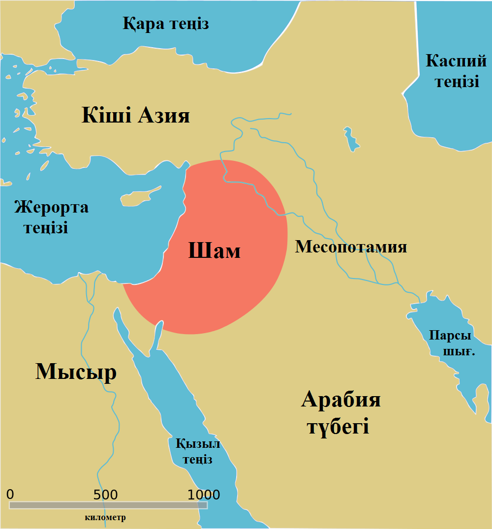 Шам аймағының картасы